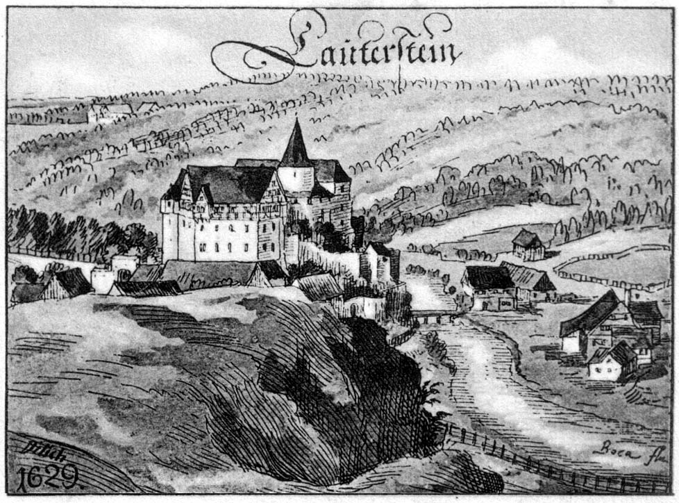 Schloss Lauterstein nach einer Zeichnung von W. Dilich, 1629